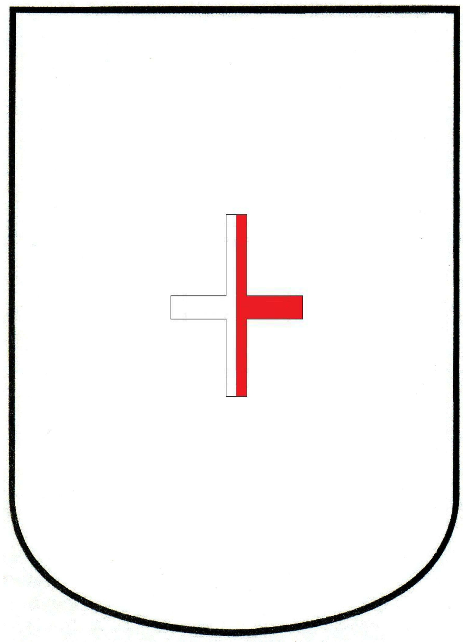 Escudo de la Orden religioso-militar de Montegaudio